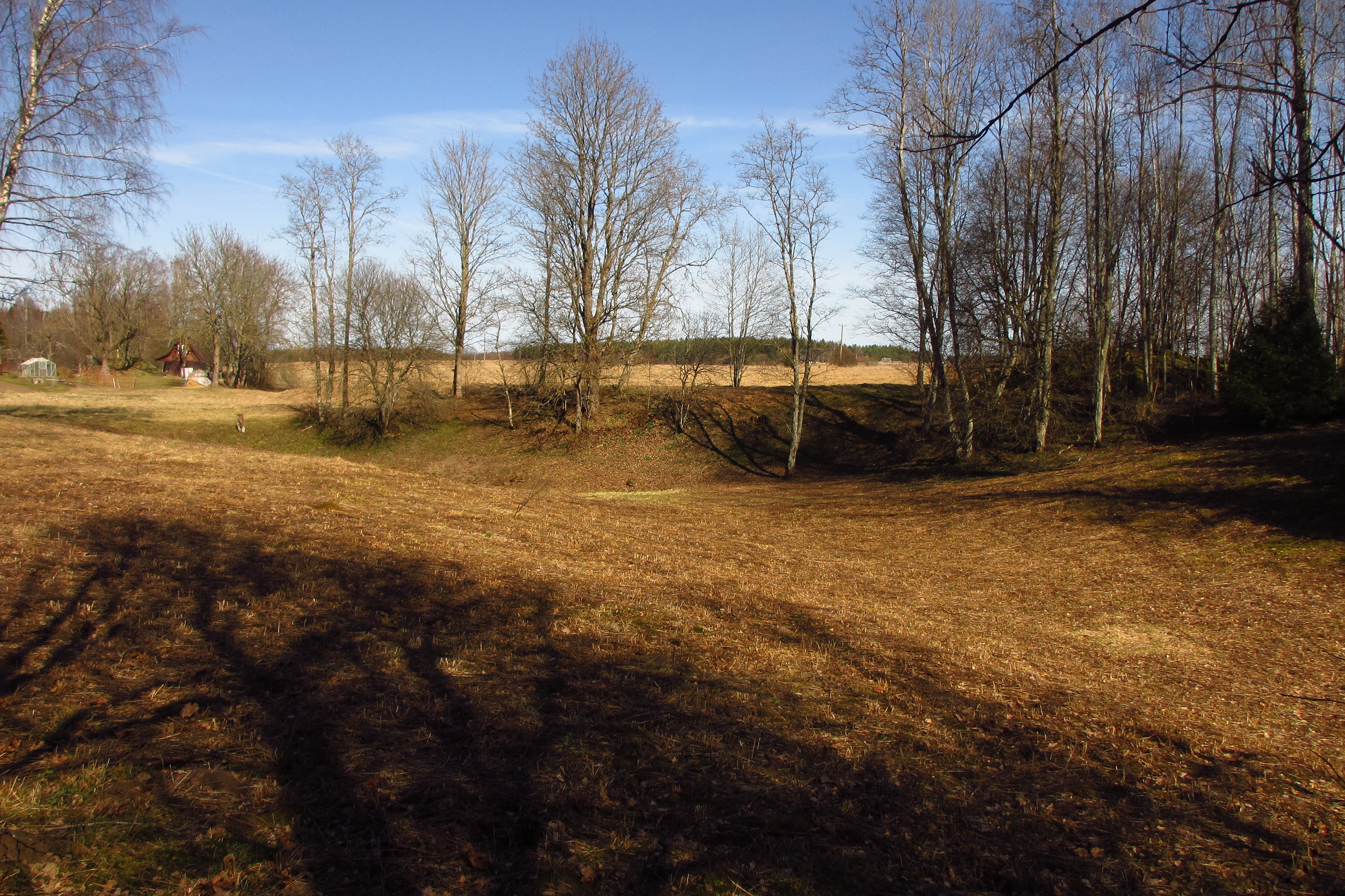 Aandu karstiala